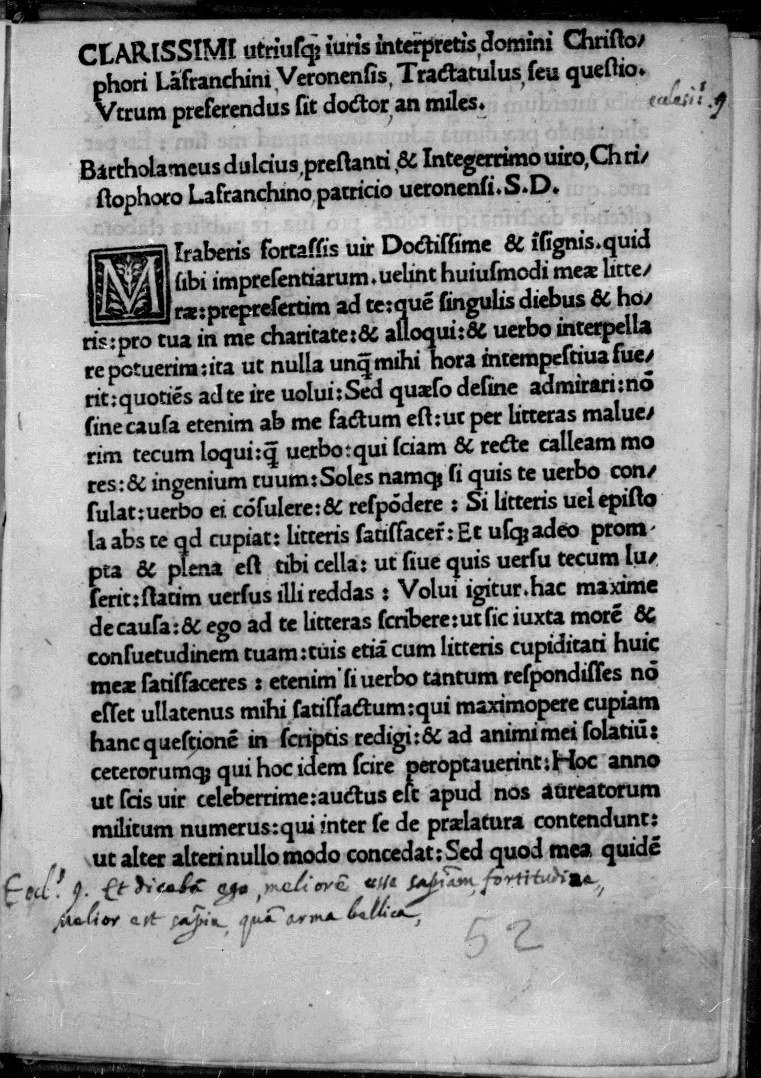 carta a1r